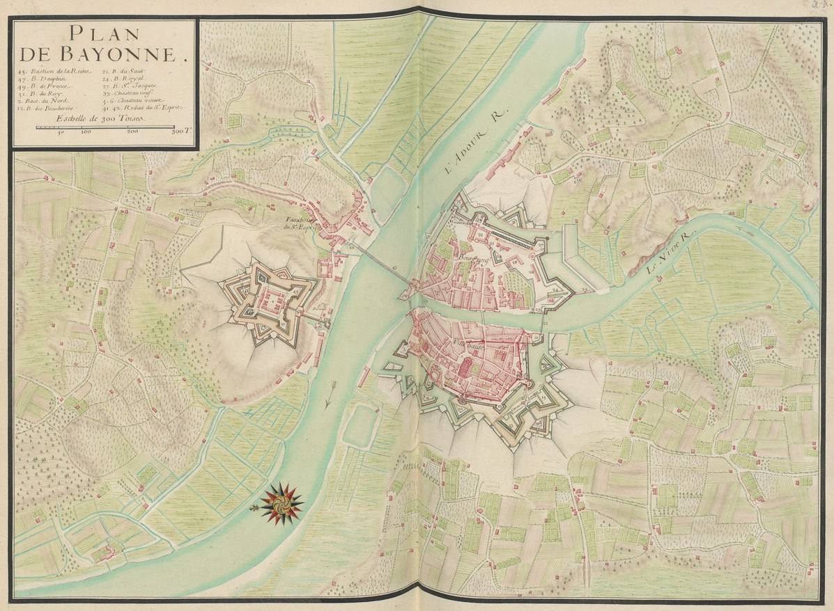 Plan de la ville de Bayonne et de ses fortifications. Extrait du Recueil des plans des places du Royaume, divisées en provinces, faits en l'an 1693. Format : 36 x 50 cm (double page).